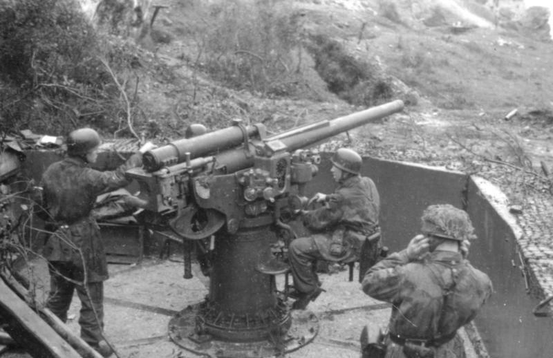 San Felice (Monte Circeo).- Besichtigung des Abschnitt Süd durch KG [kommandierenden General] Information added by Wikimedia users.